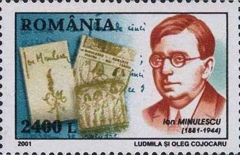 Ion Minulescu